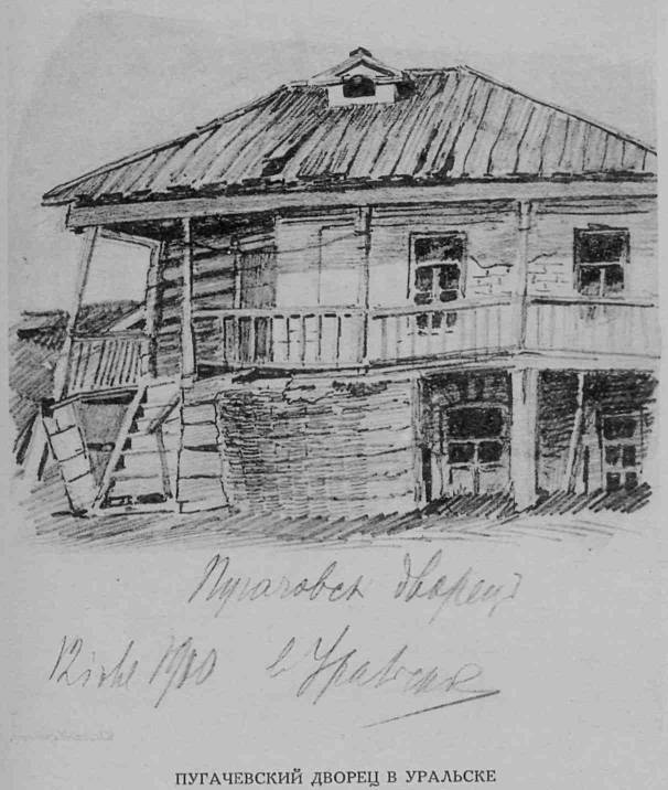 "Дворец Пугачёва" в Уральске - рисунок В. Г. Короленко